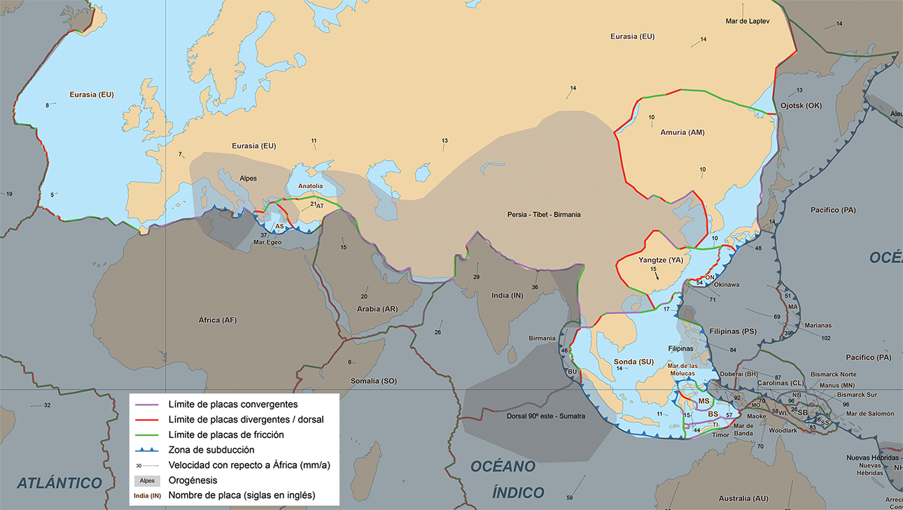 Placa tectónica Euroasiática